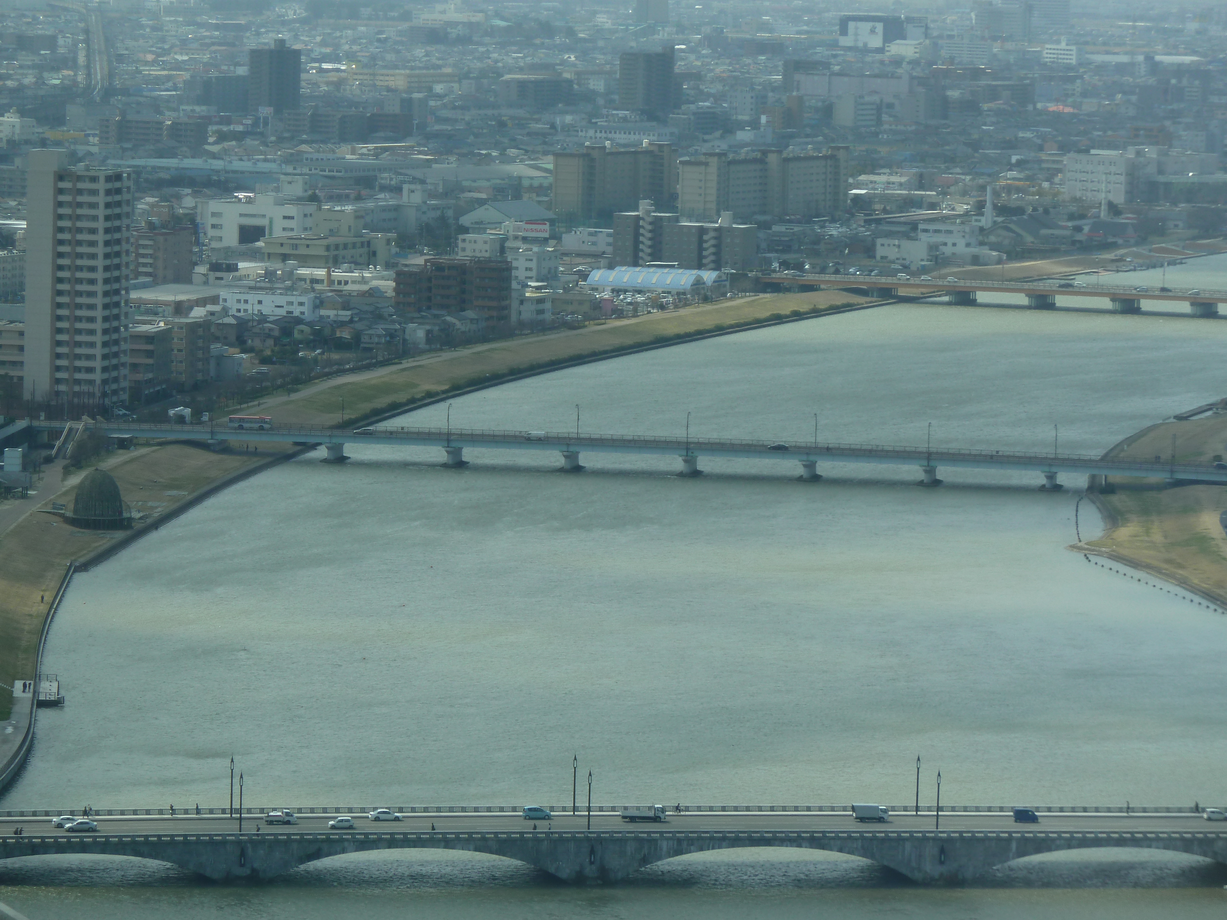 八千代大橋